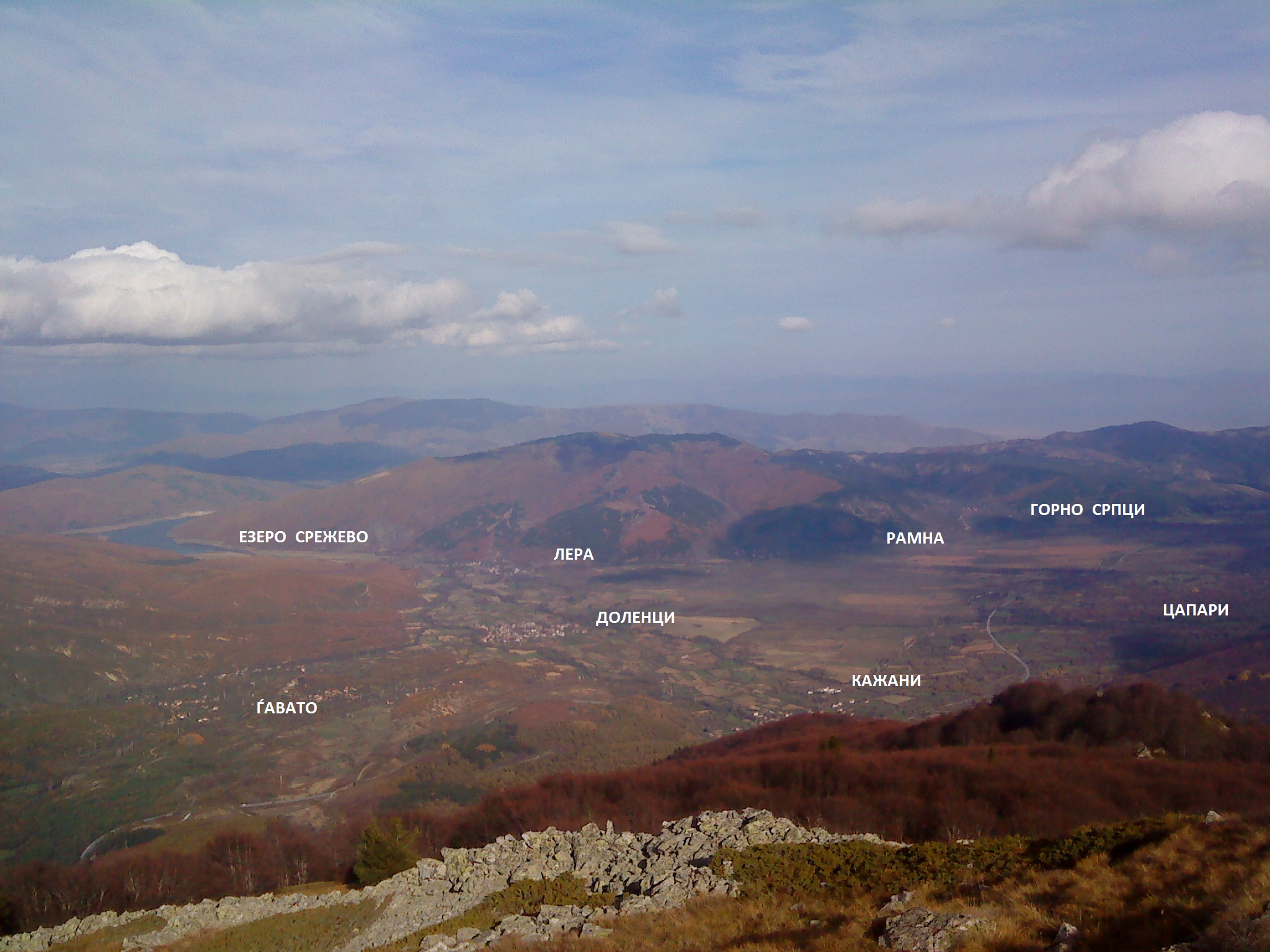 Pogled od vrvot Vrteska 2010